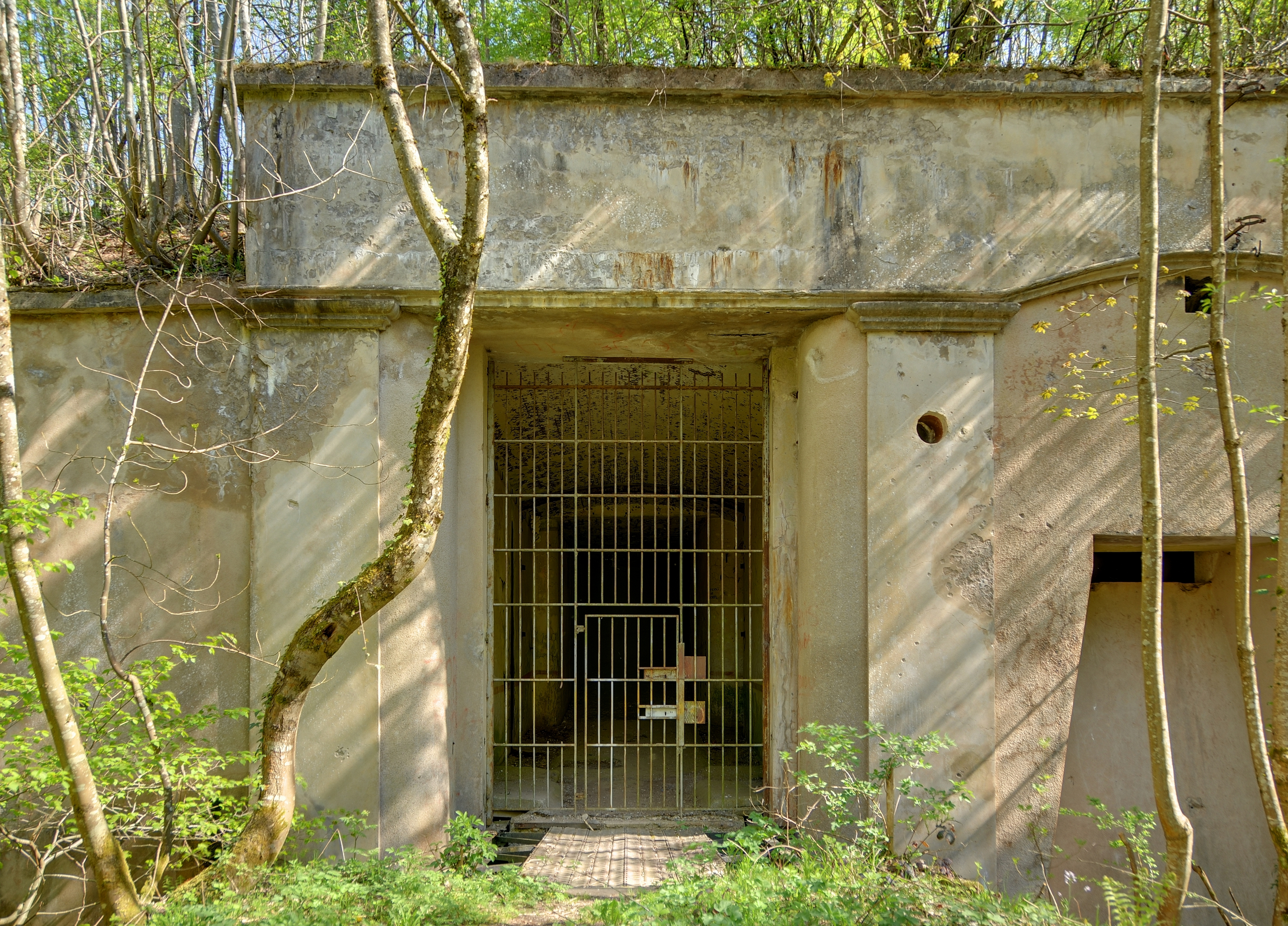 Entrée principale du fort. Roppe fortifications (HDR).